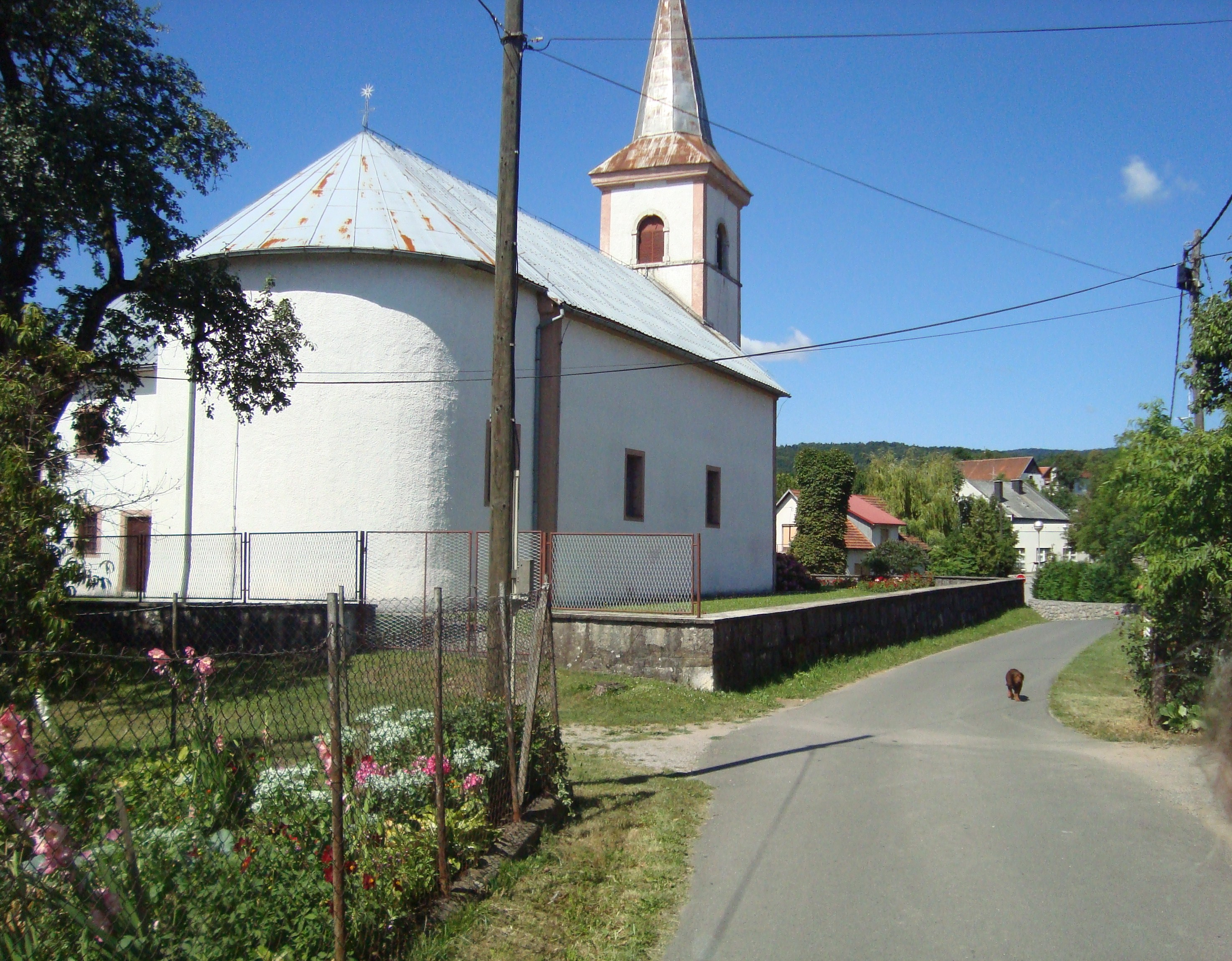 Crkva sv.Marije Lukovdol